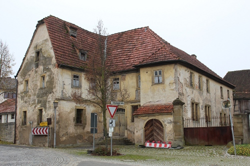 Das ehem. Gasthaus "Zapf"